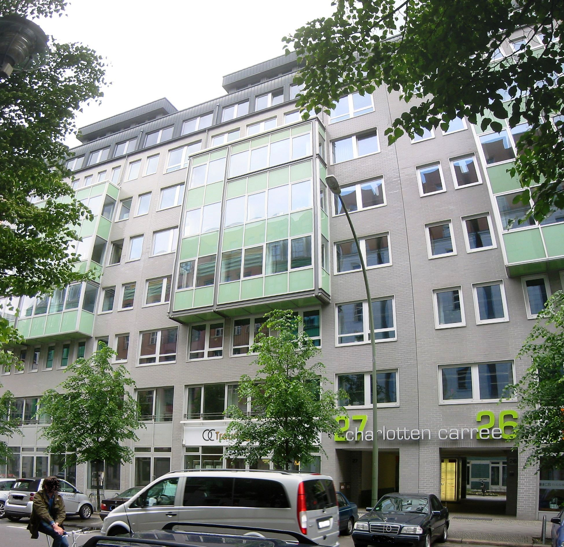 Deutsches Institut für Menschenrechte in der Zimmerstraße in Berlin-Mitte